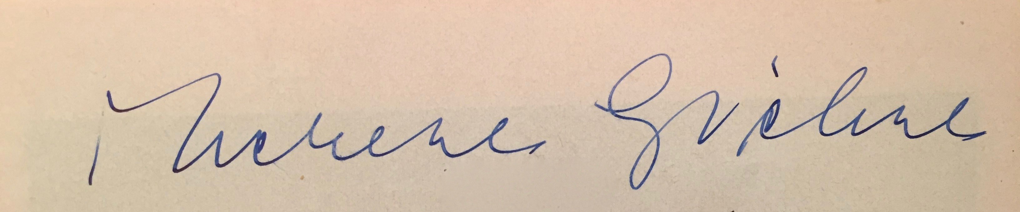 Autogramm von Therese Giehse (von Anfang 1970er Jahre)